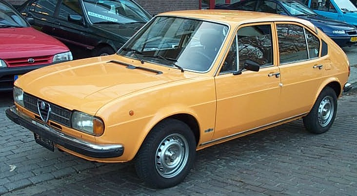 Alfasud sedan/saloon